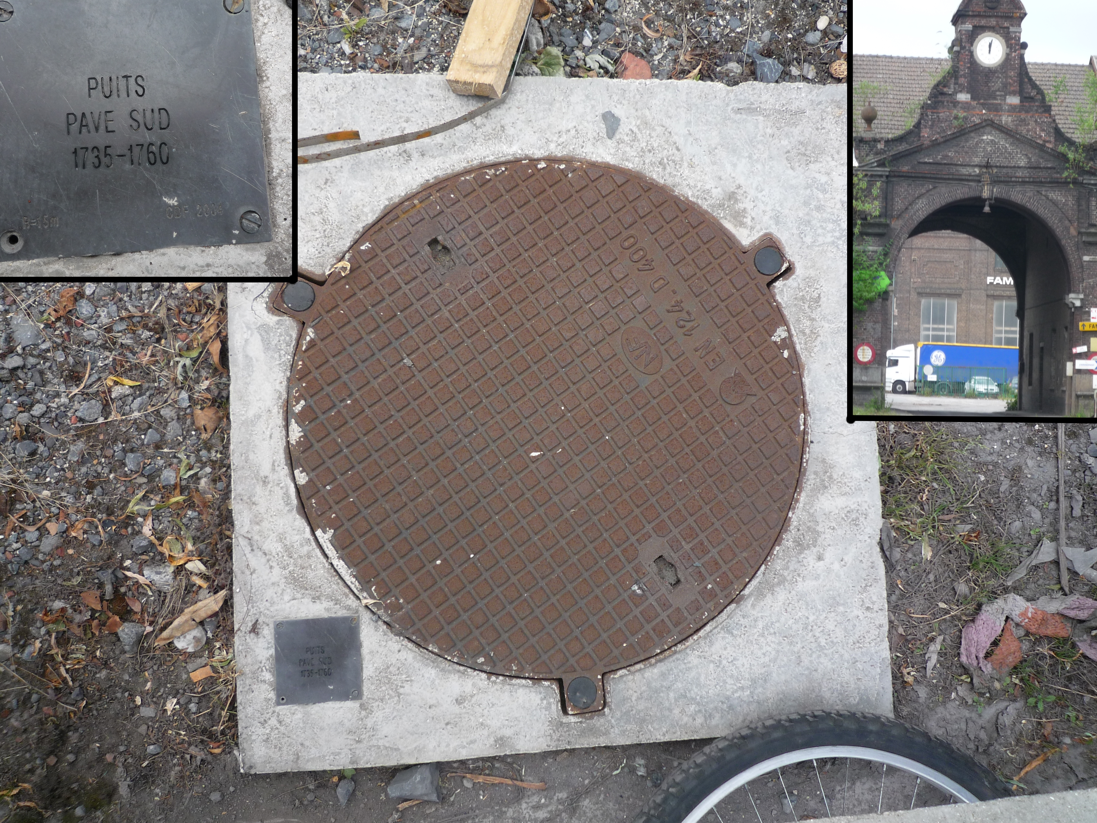 La fosse du Pavé de la Société Desandrouin-Taffin puis de la Compagnie des mines d'Anzin était un charbonnage du bassin minier du Nord-Pas-de-Calais constitué de deux puits situé à Anzin, Nord, Nord-Pas-de-Calais, France.